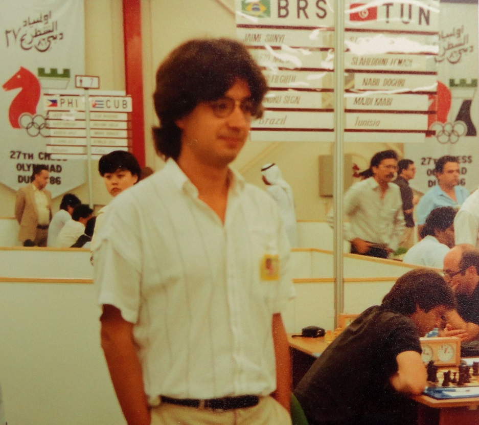 Jaime Sunye Neto, Schacholympiade 1986 in Dubai.